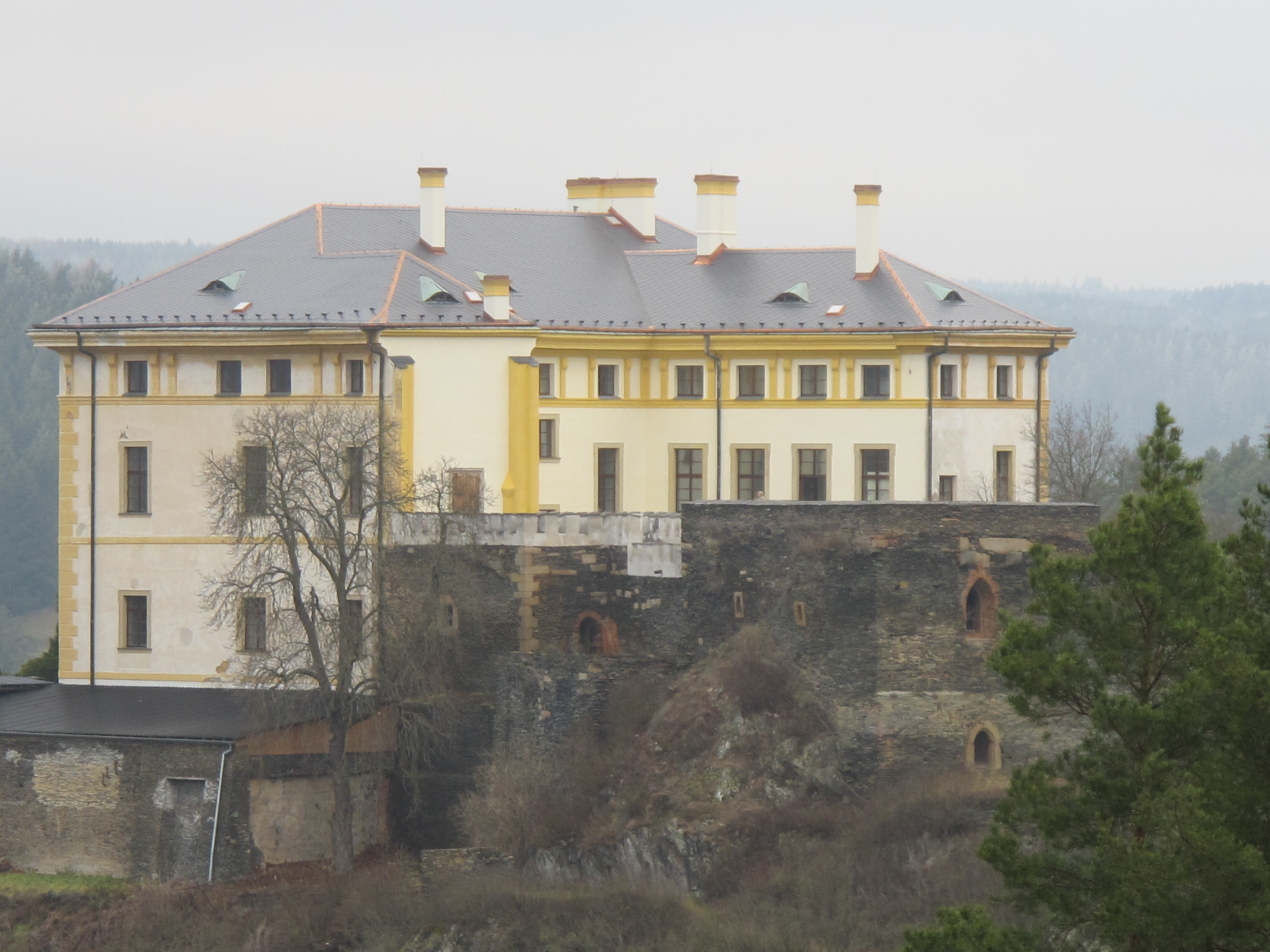 Zámek Rabštejn nad Střelou